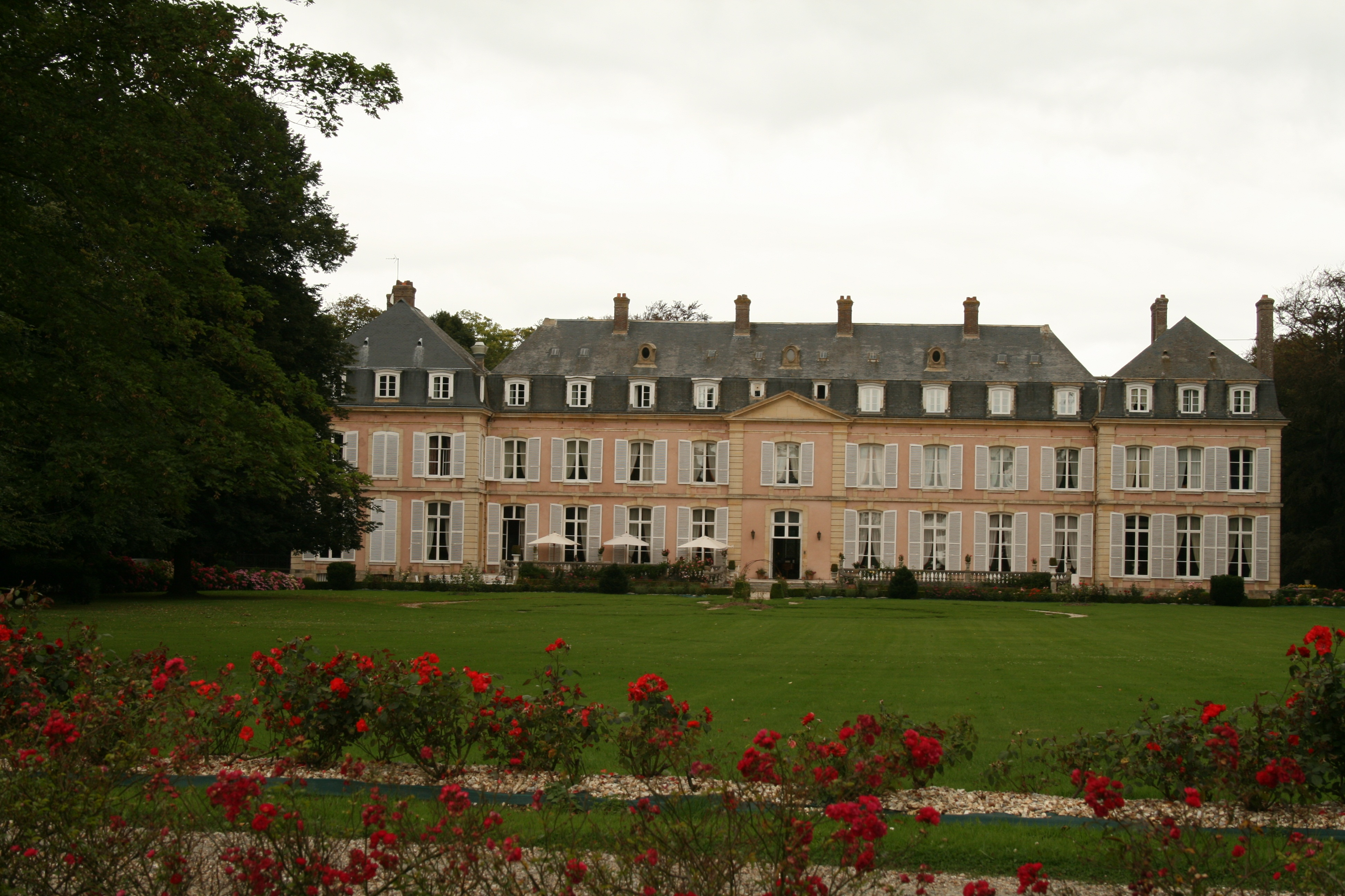 Sassetot le Mauconduit 2011 - Chateau de Sassetot